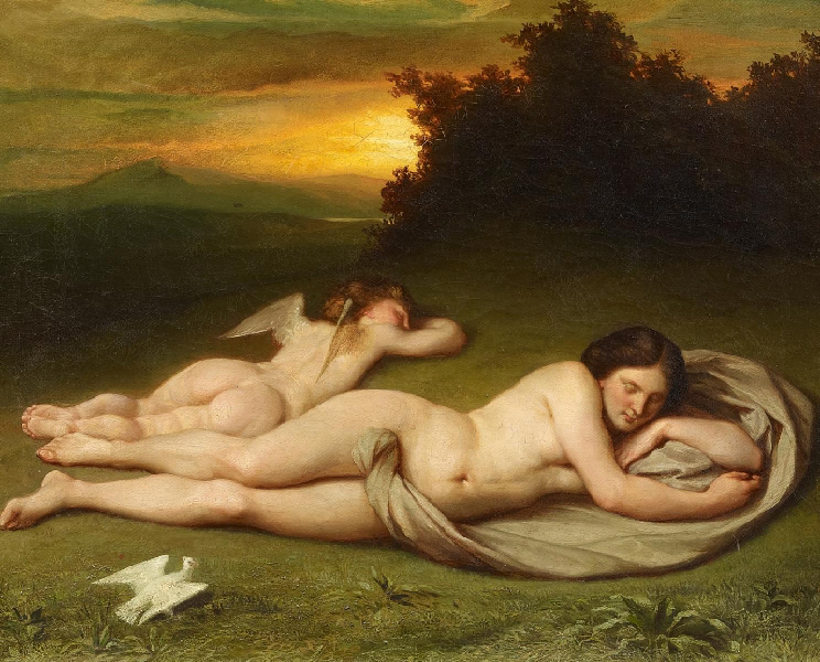 Hermann Steinfurth (Hermann Steinfurth zugeschrieben) - Schlafende Venus und Amor (auch fälschlicherweise Luna und Endymion)